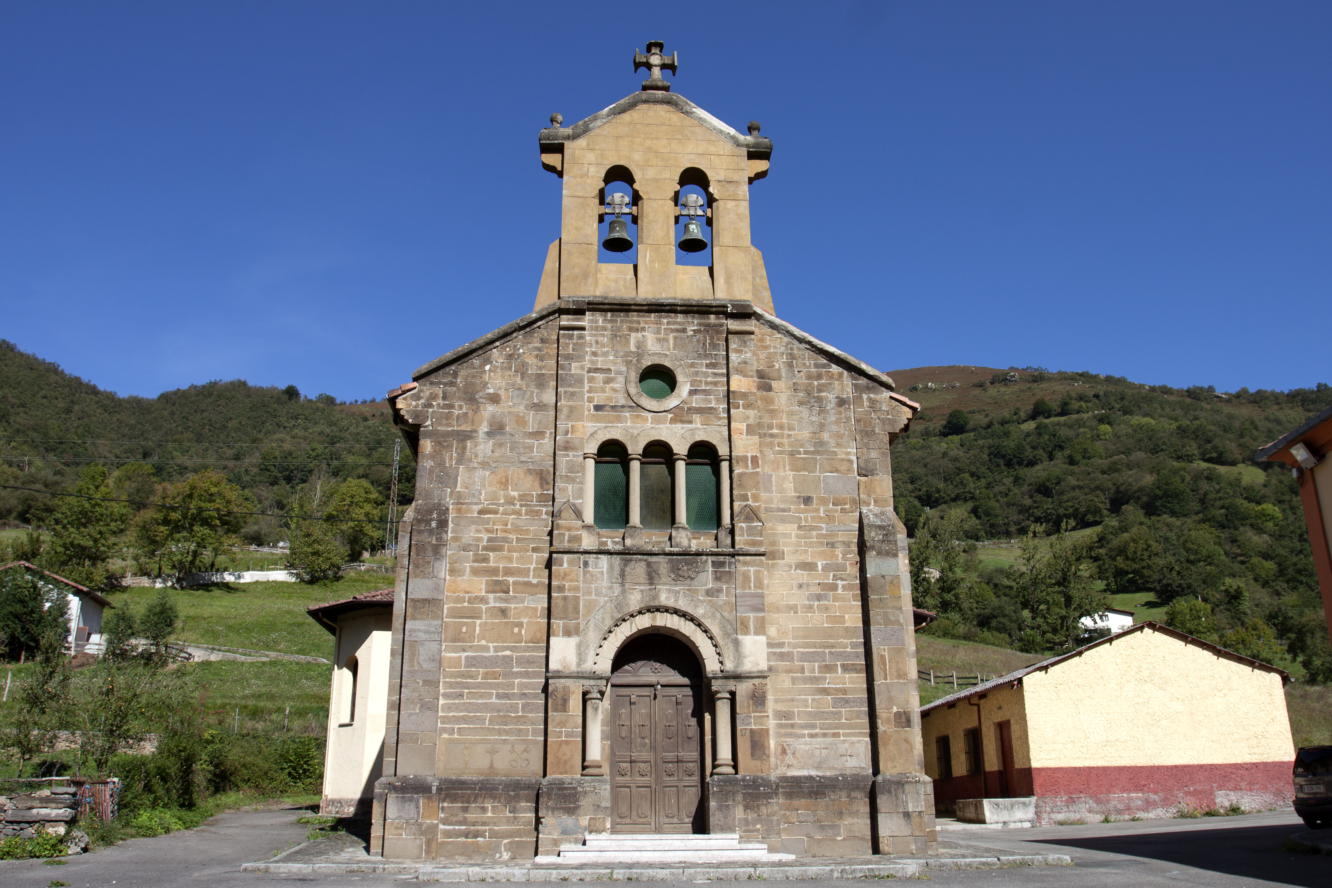 Nembra (Aller, Asturias)